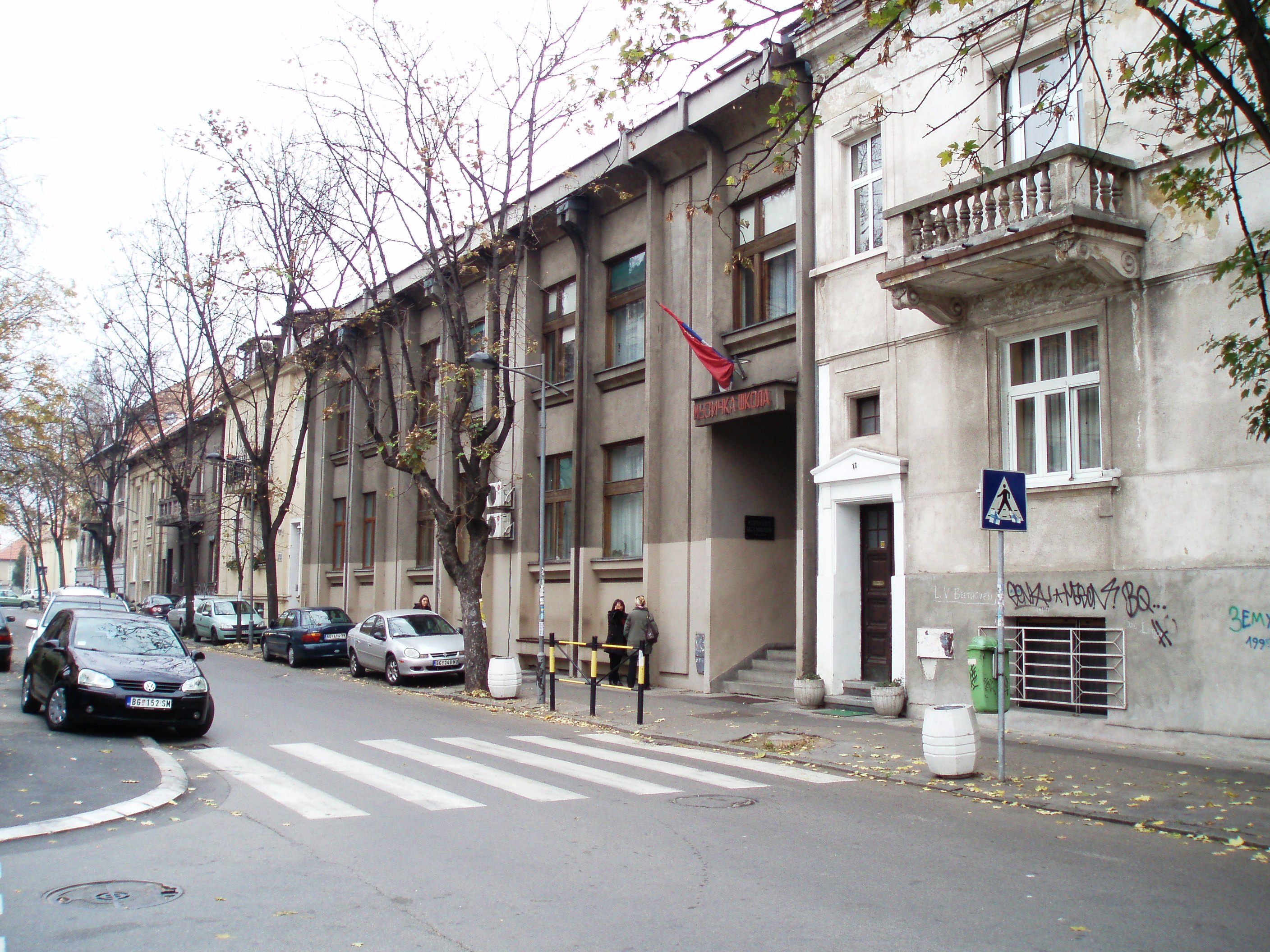 Zgrada muzičke škole Kosta Manojlović u Zemunu, autor fotografije: Nicolo